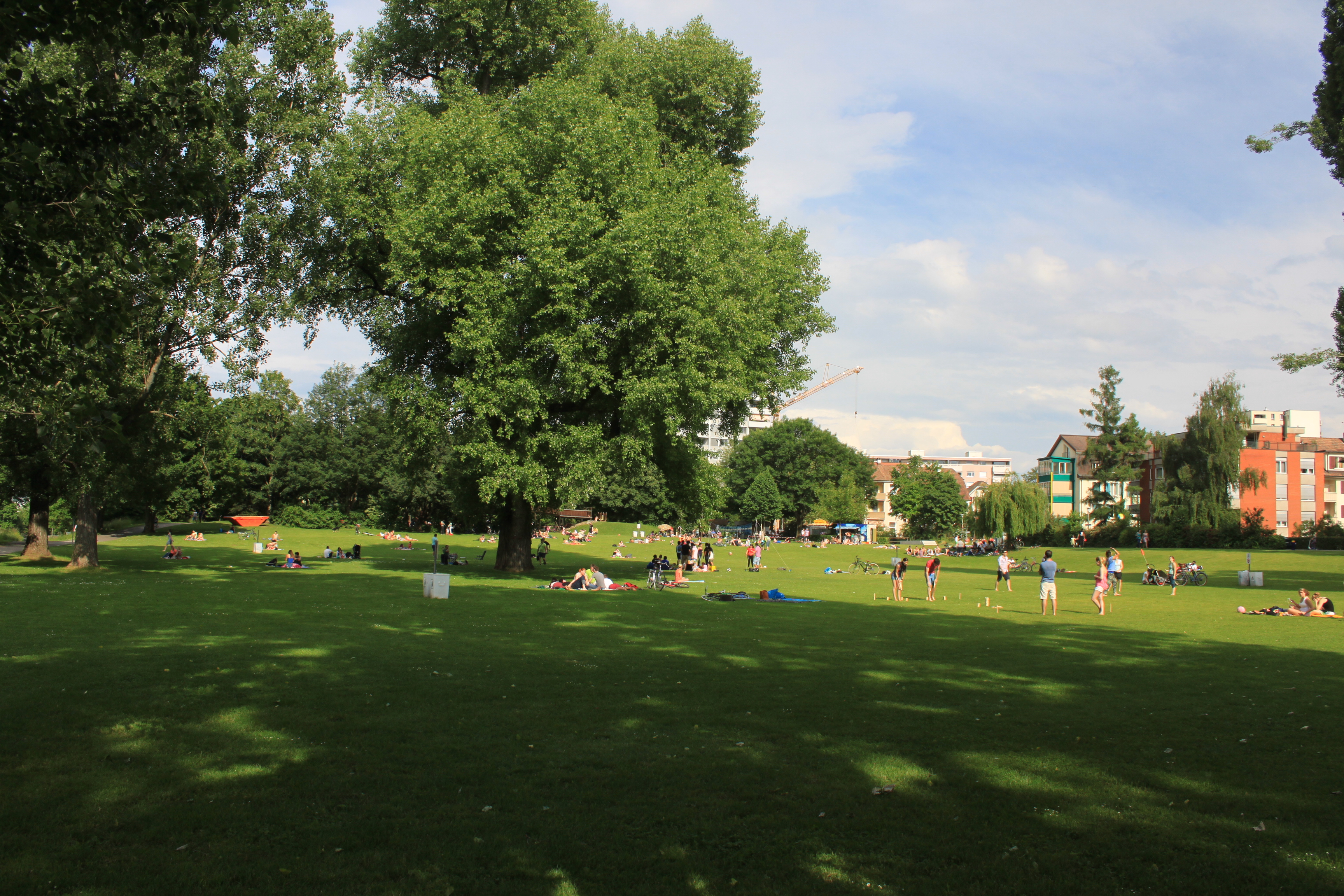 Birsköpfli